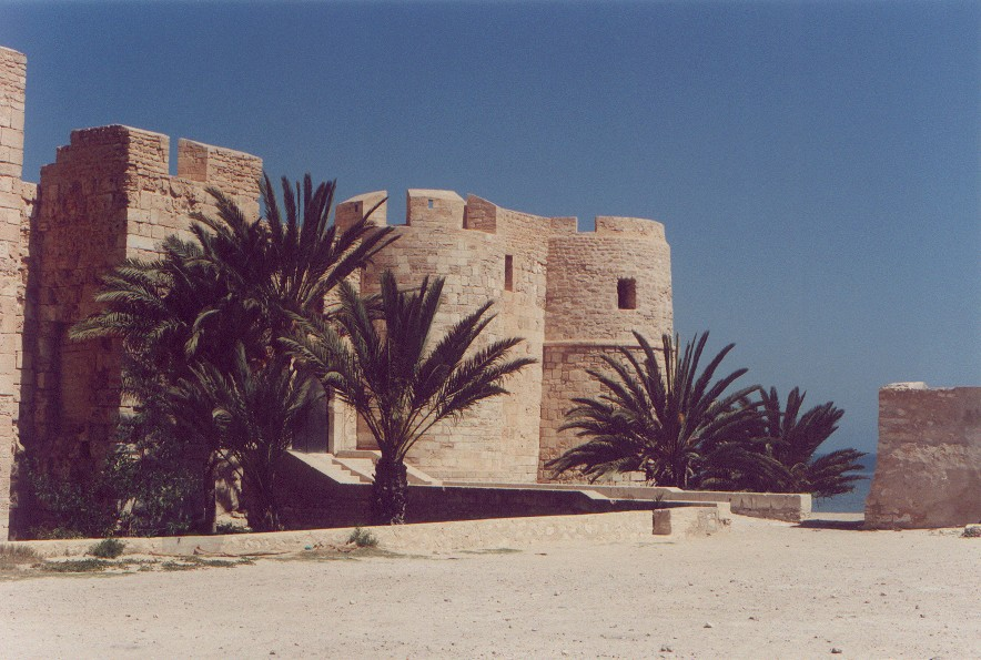 Borj Ghazi Mustapha